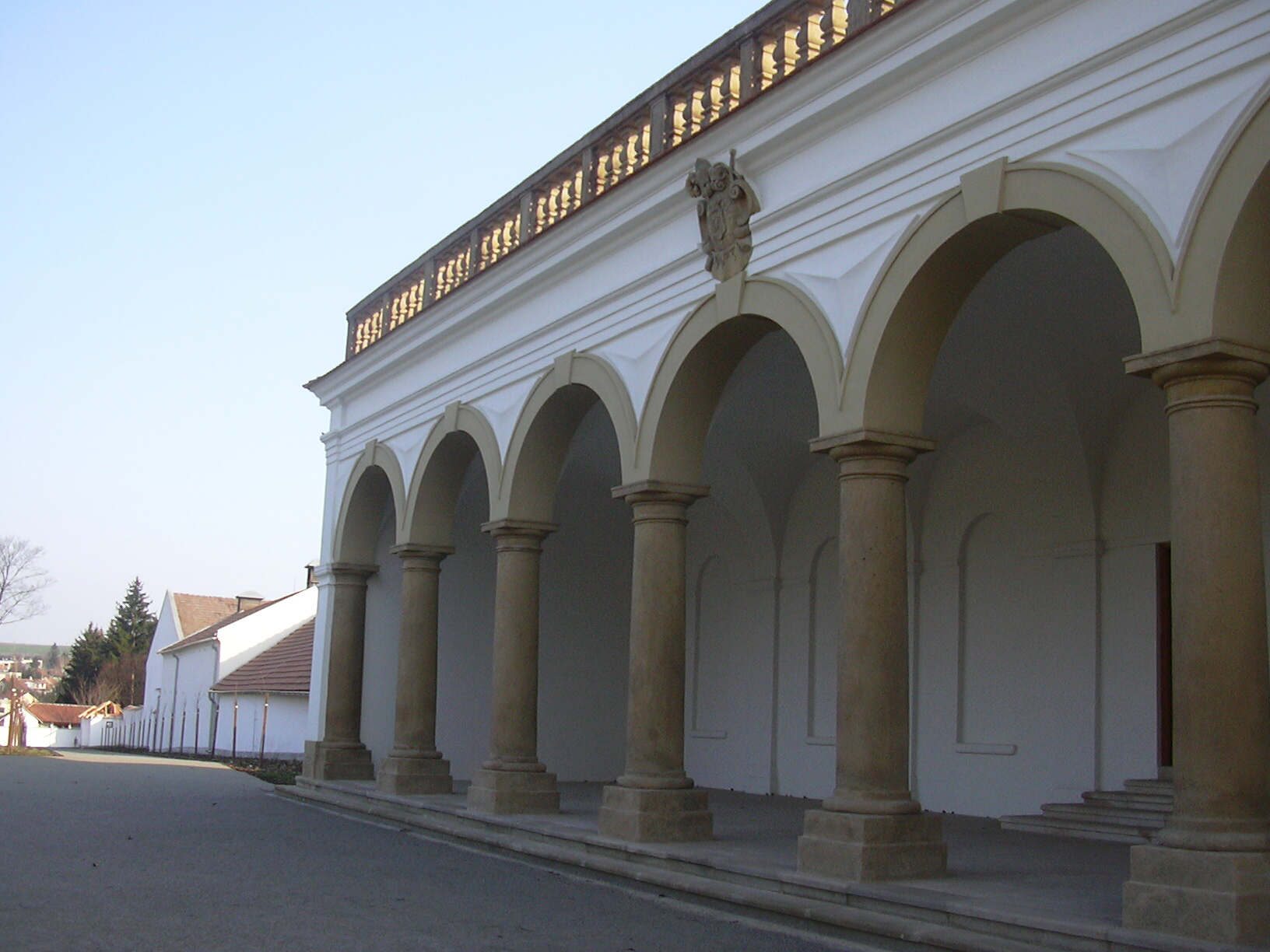 Zámecká zahrada ve Vyškově.